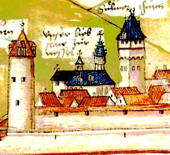 Das Heilbronner Karmeliterkloster um 1557. Detail von File:Heilbronn 1557.jpg